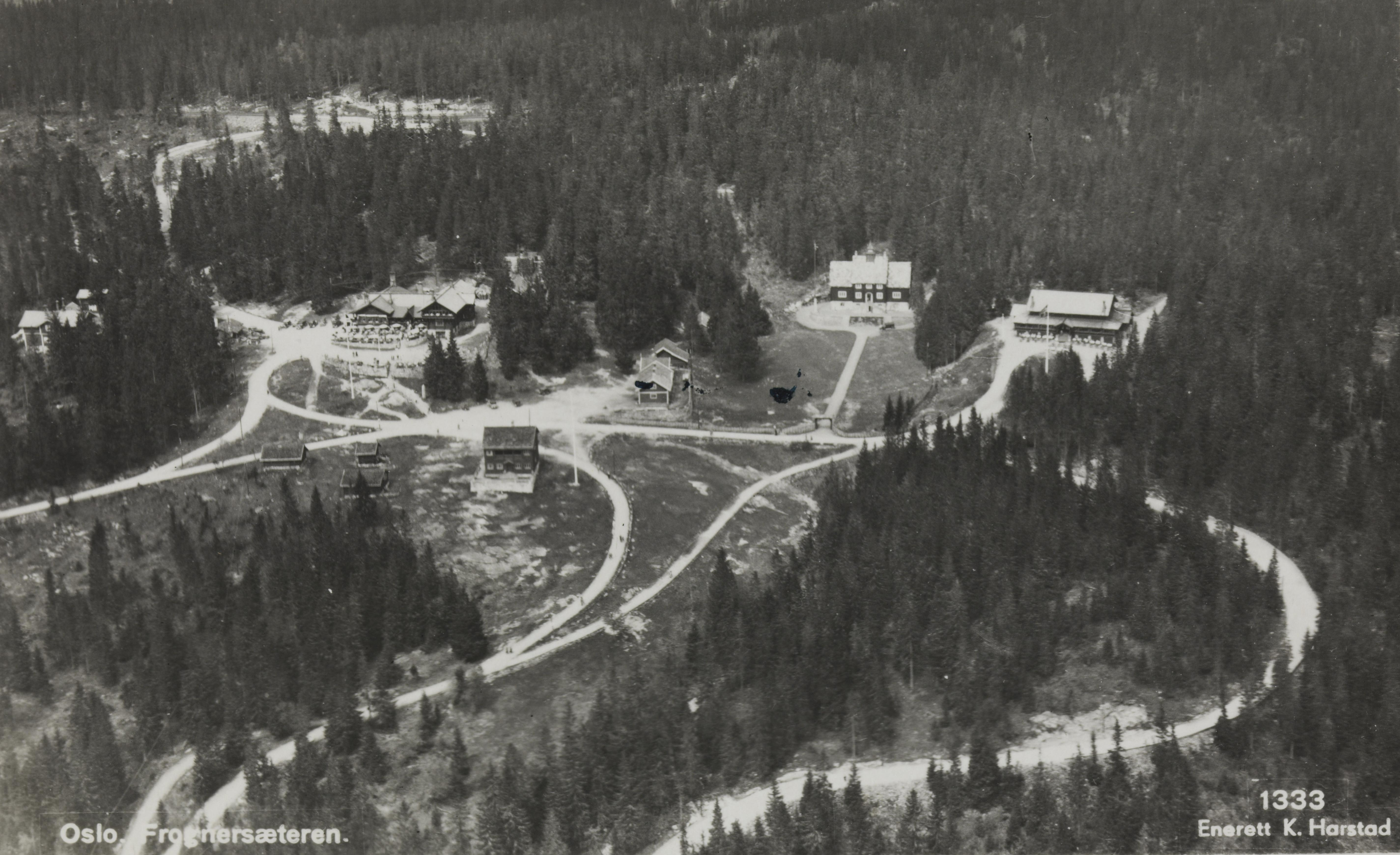 Bildet er hentet fra Nasjonalbibliotekets bildesamling Frognerseteren, Oslo, Oslo